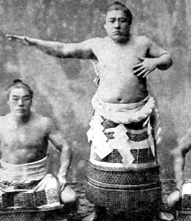 Konishiki Yasokichi, Yokozuna 1896-1901, standing while performing yokozuna dohyo-iri